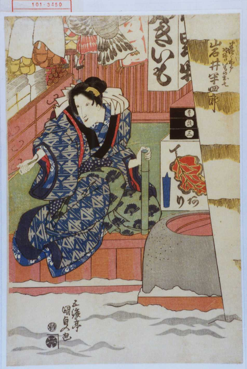 1819年作成